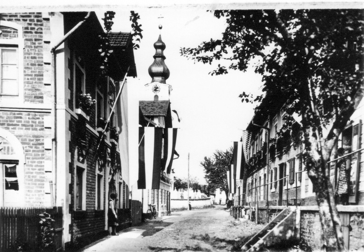 Haunzenbergersöll Hofmarkstraße 1950 Fahnen Dorfstraße Straße Fest Kirchturm Friedhof